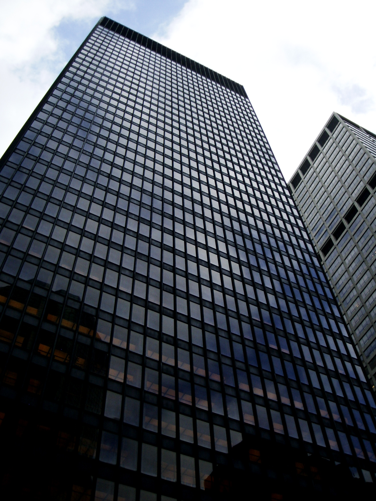 Seagram building